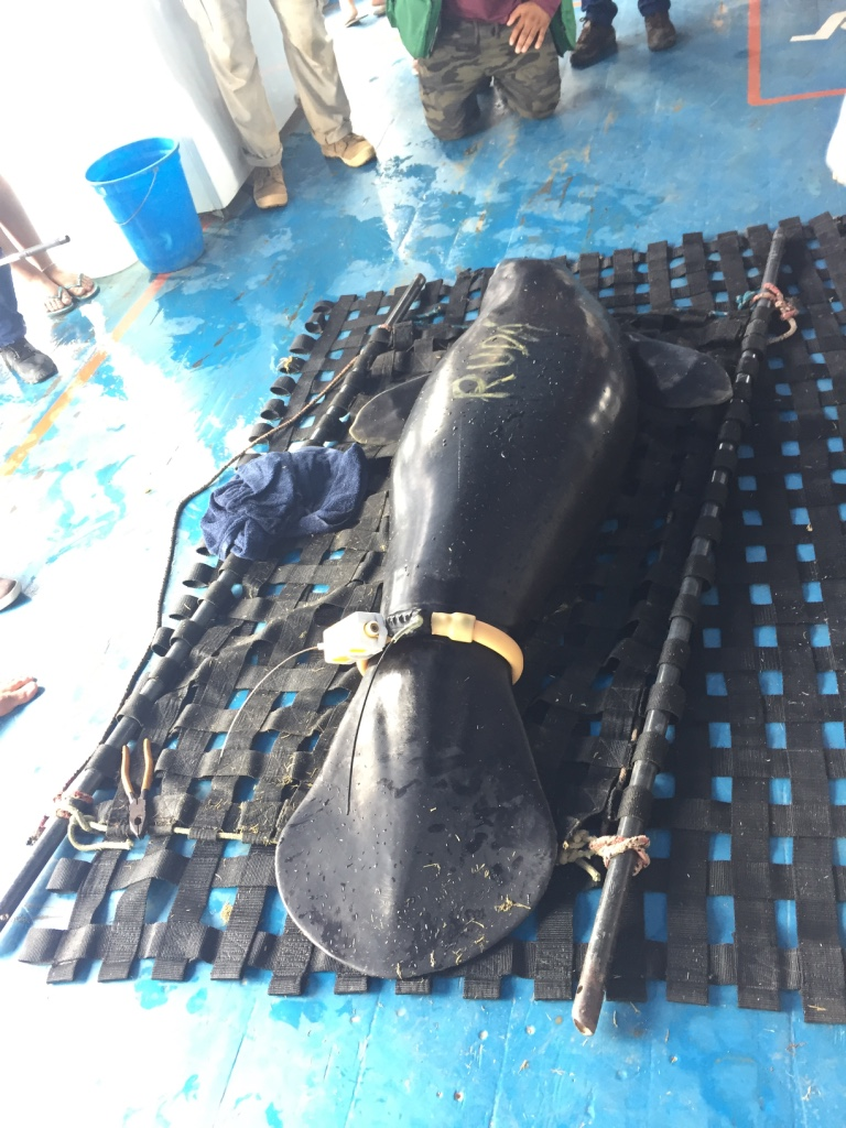 Programa de reintrodução do Peixe-boi amazônico realizado pelo INPA (Instituto Nacional de Pesquisas da Amazônia) e colaboradores.